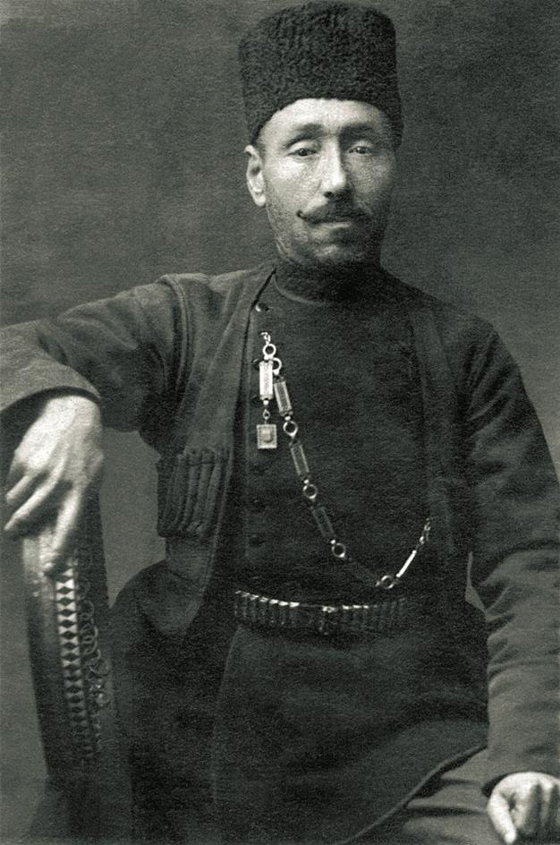 Ансамбль Кечачи оглы Мухаммеда. 1912 г. Варшава. Слева направо: Кечачи оглы Мухаммед. Гурбан Пиримов, Саша Огансзашвили.